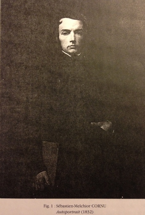 Autoportrait